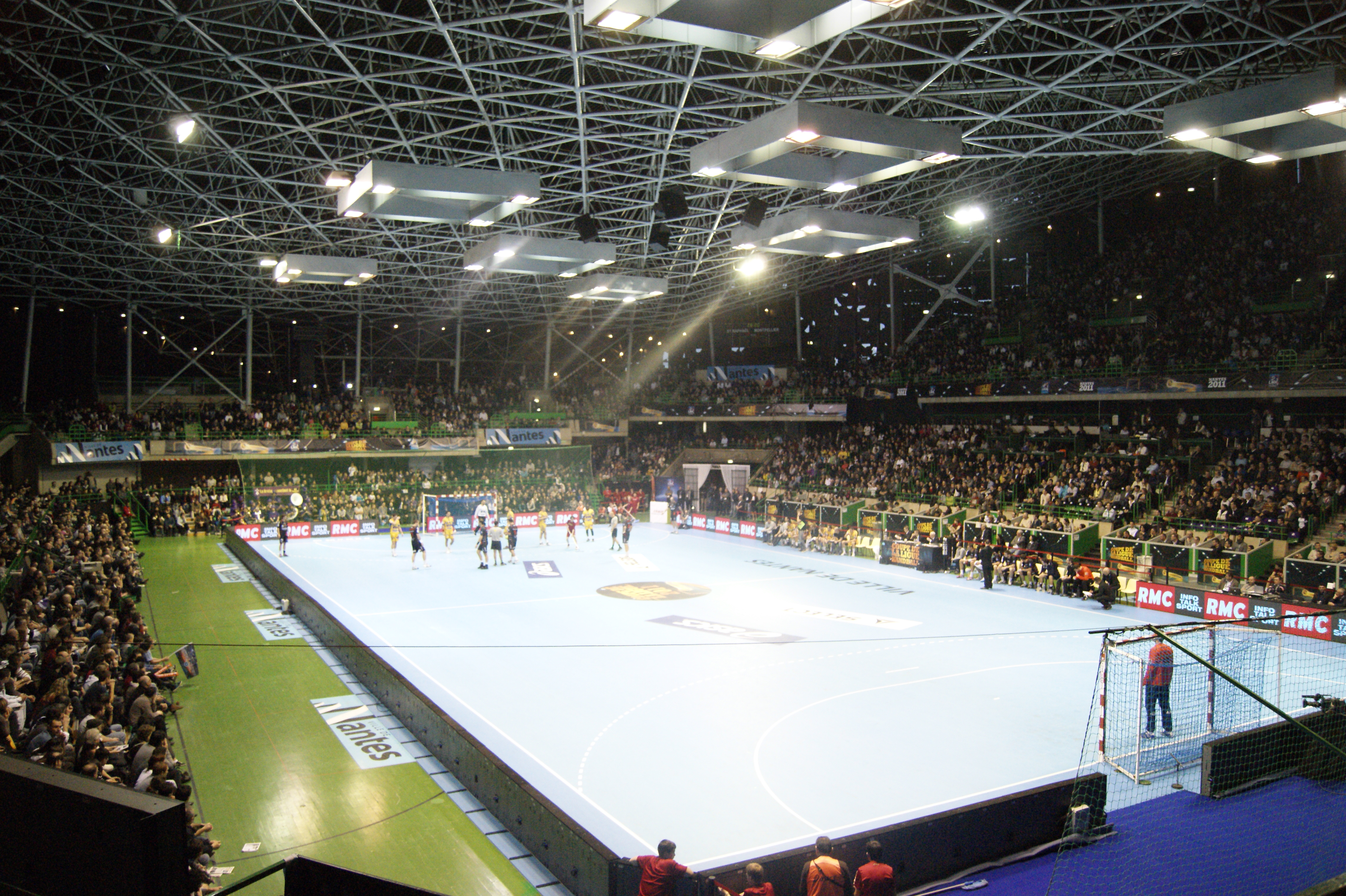 Le Palais des sports de Beaulieu de Nantes complet pour l'affiche de finale de coupe de la ligue de handball 2011, Montpellier contre Saint-Raphael.